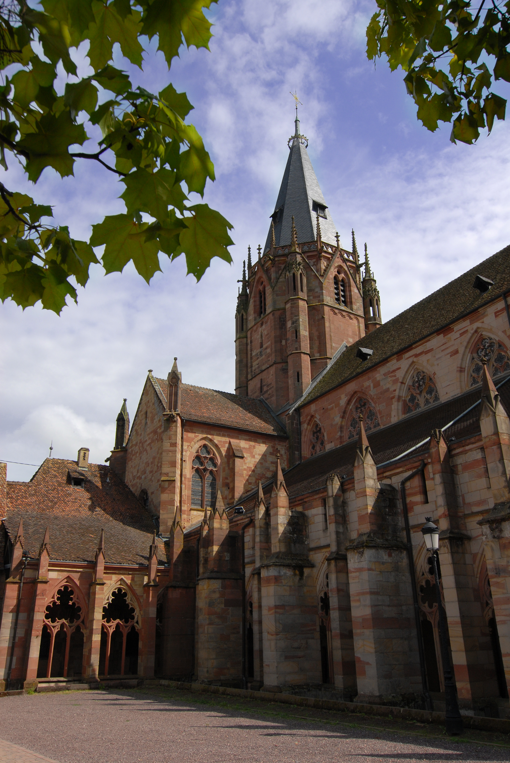 Holiday_021